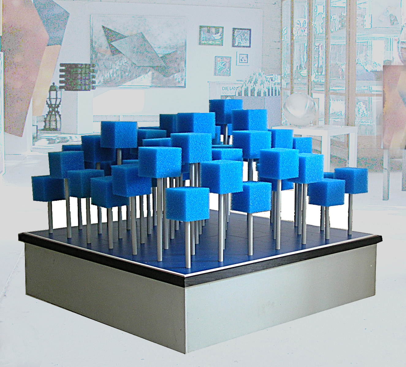 49 Schaumstoffwürfel